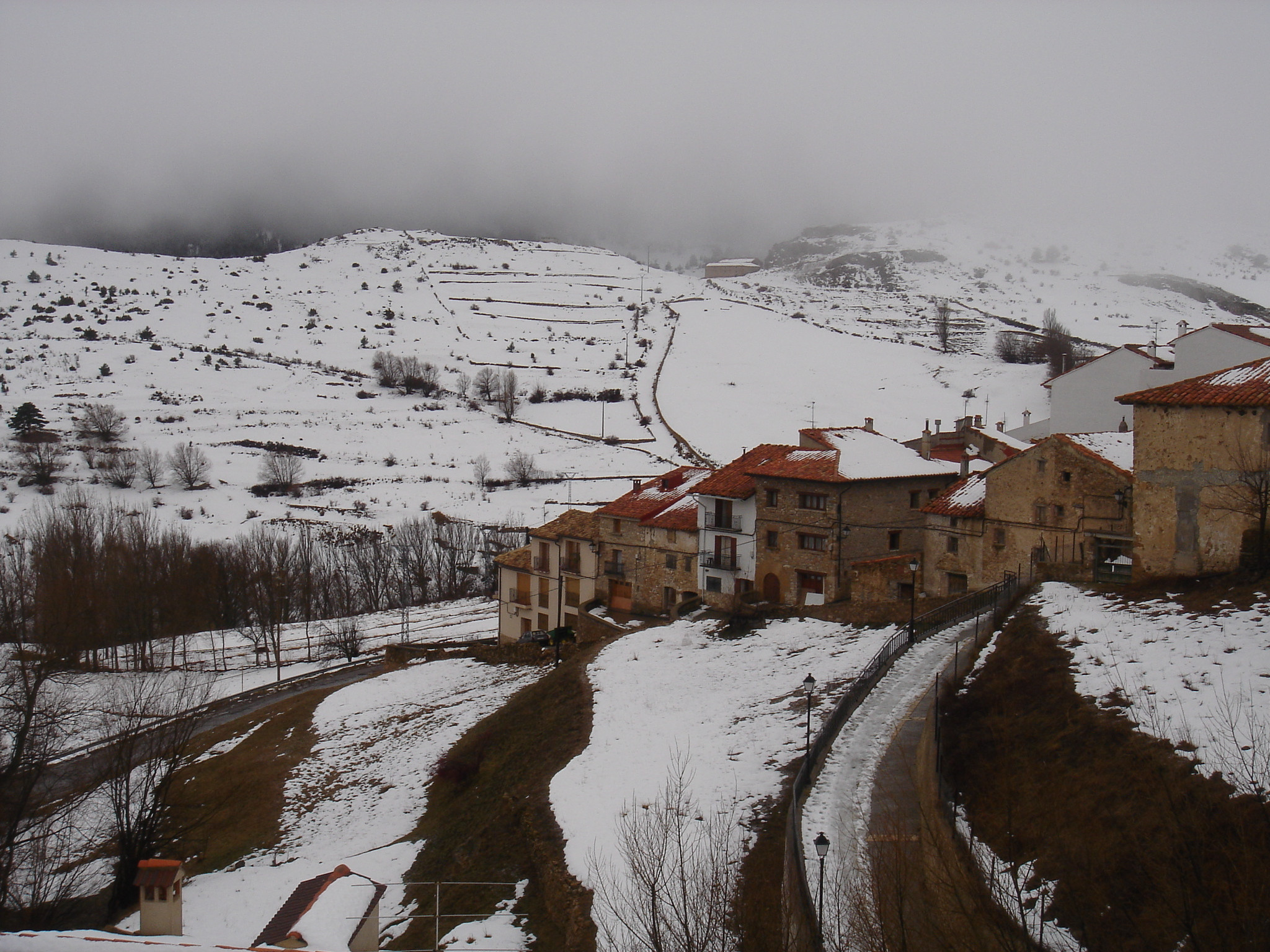 Pueblo de Valdelinares